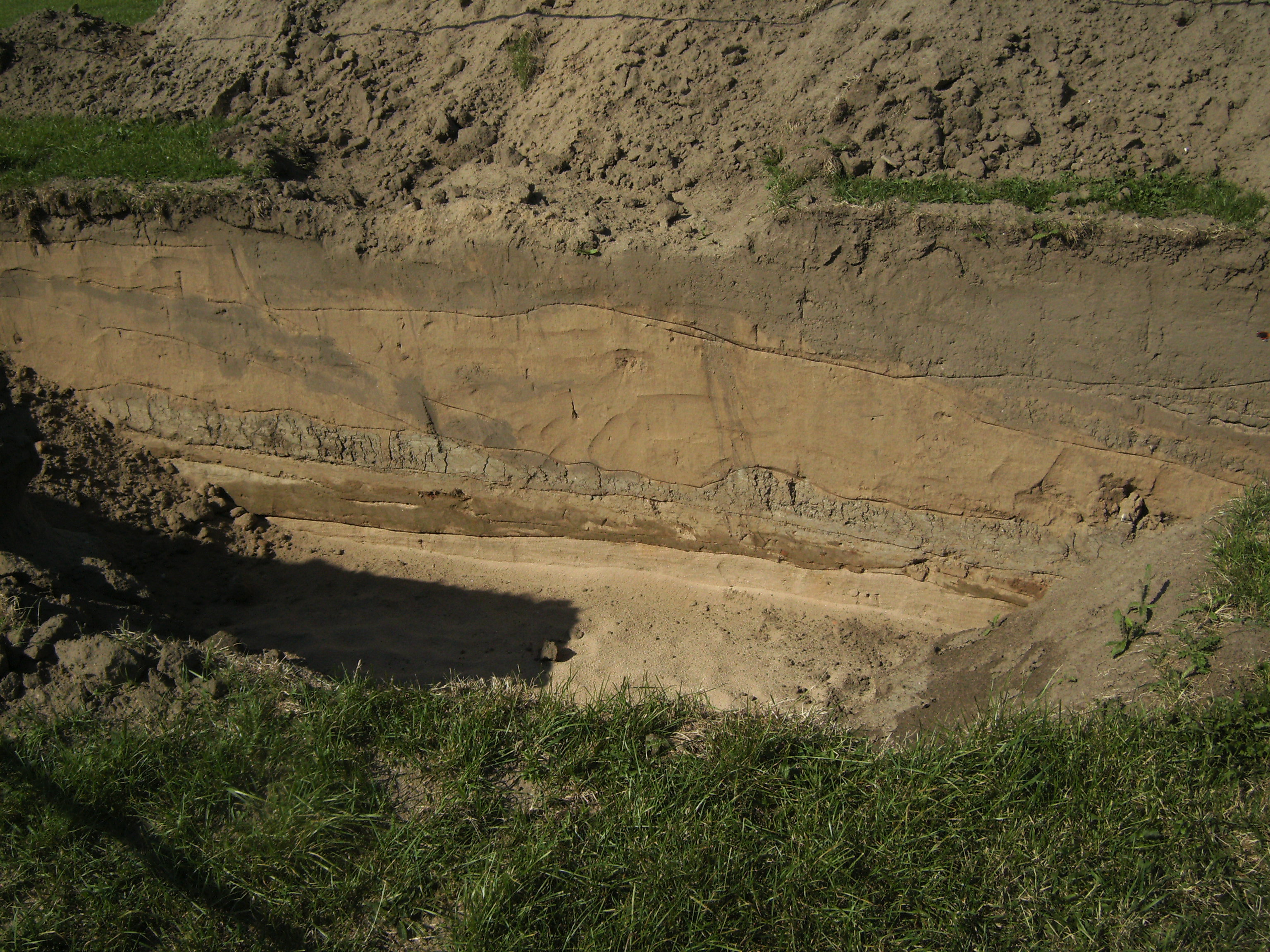 Proefsleuf in de uiterwaard aan de linkeroever van de IJssel tussen A1 en W-brug